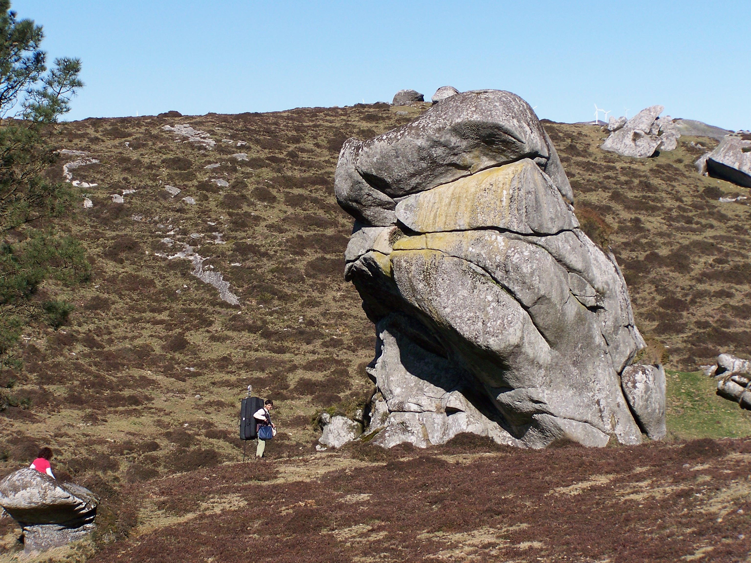 Serra do Xistral, Montouto, Abadín